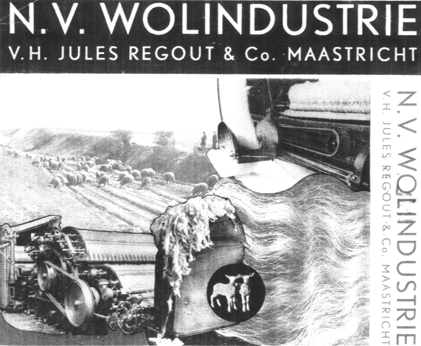 Reclameprent van de wollen dekenfabriek N.V. Wolindustrie v/h Jules Regout & Co. (1875-1936) in Maastricht.